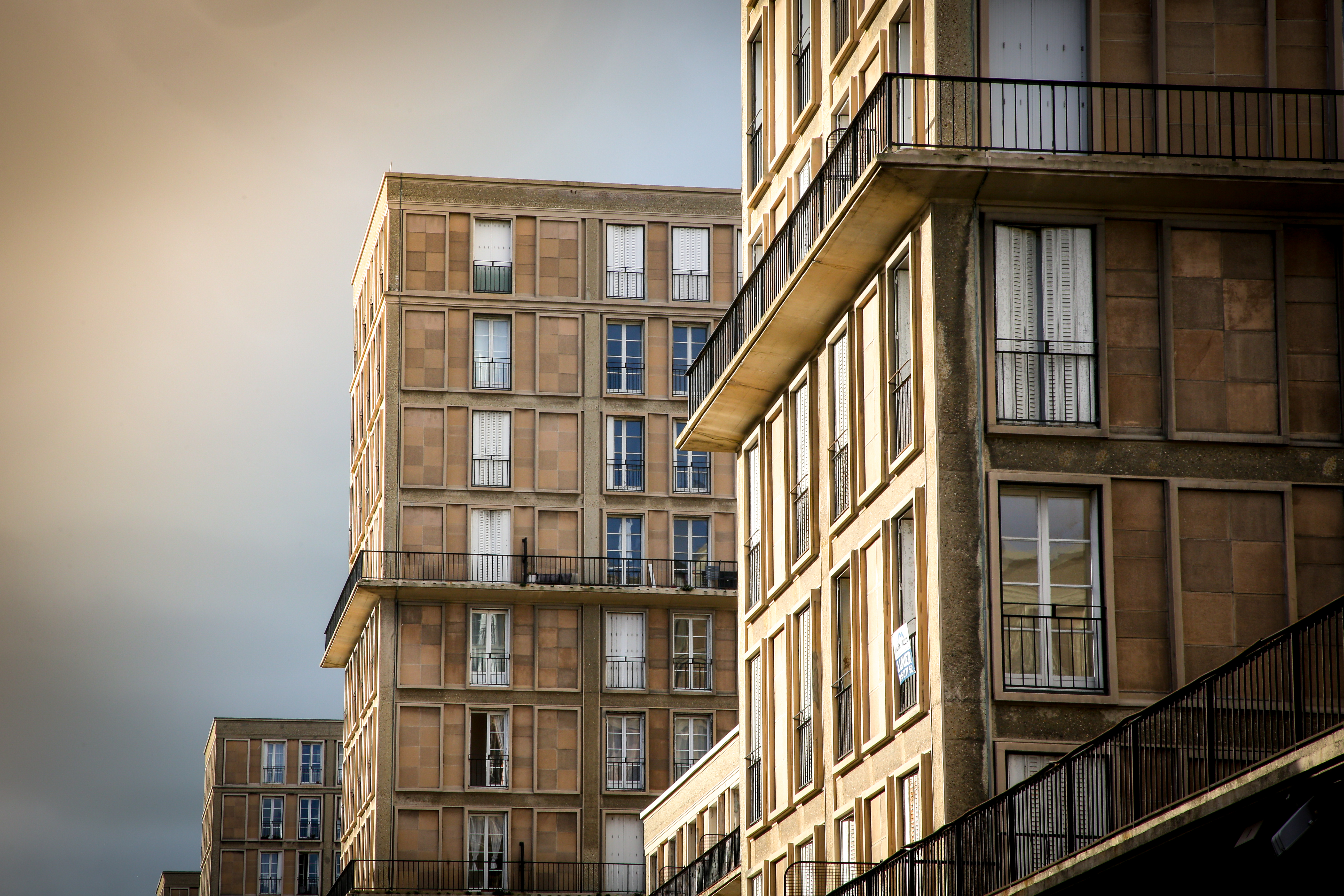 L'architecture Perret, classée au patrimoine mondial de l'UNESCO en 1995